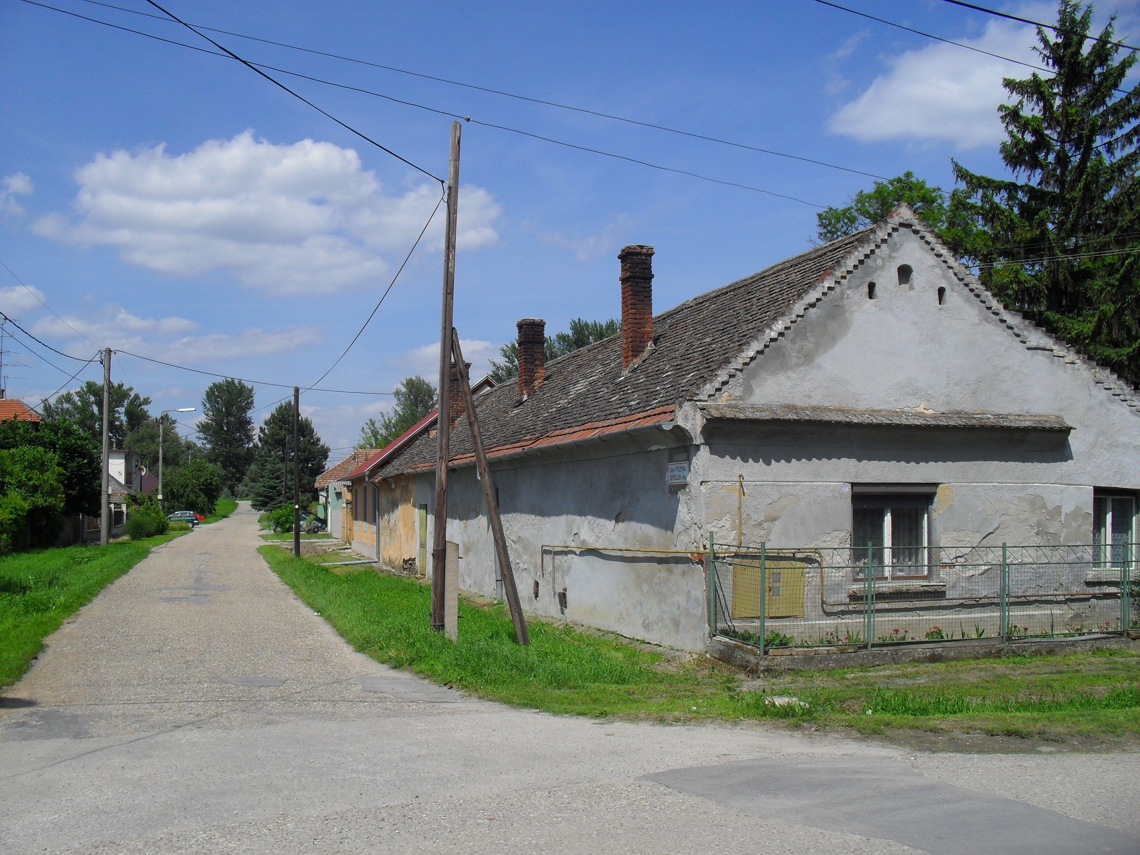 Gúta - régi ház a Győzelem utcában